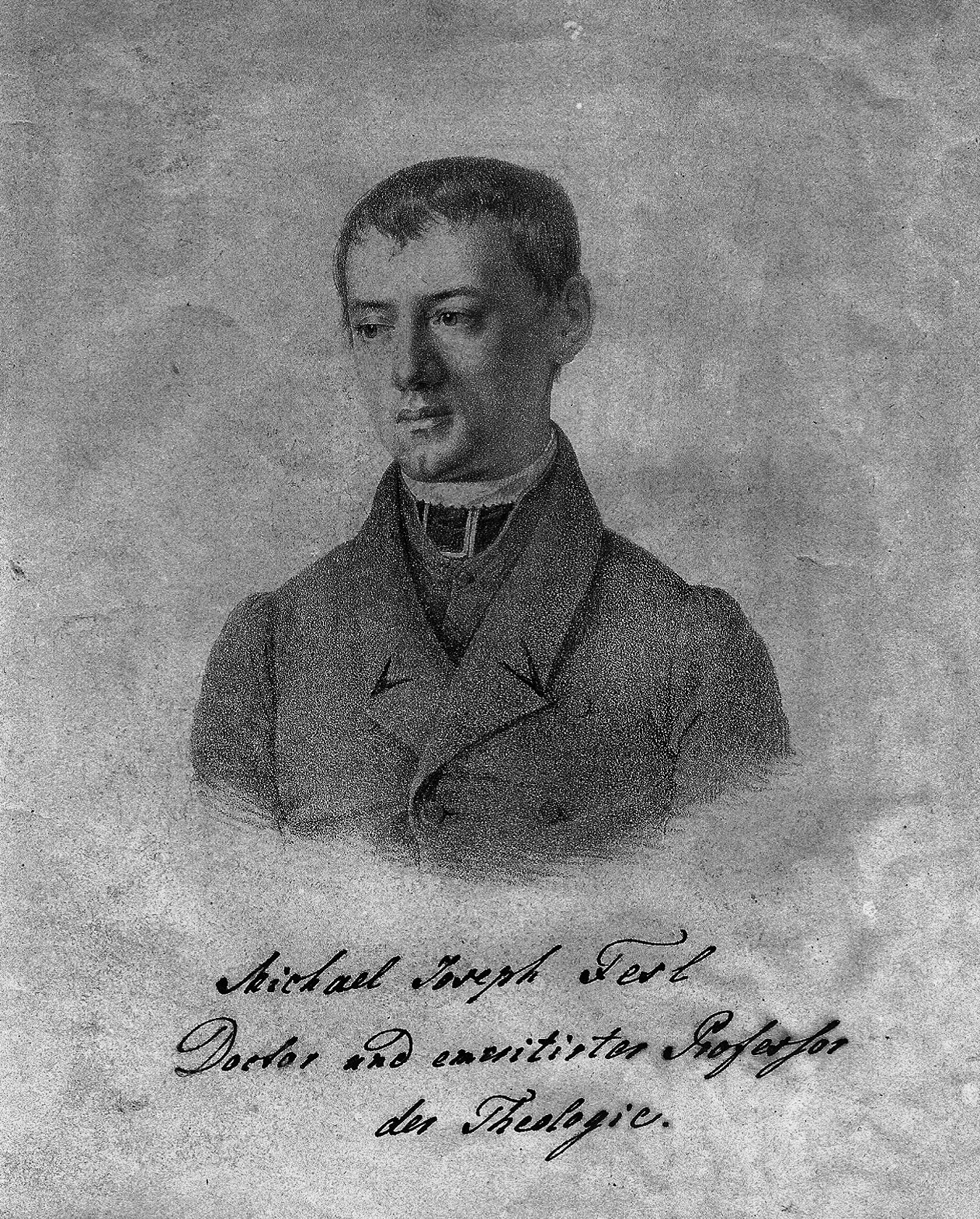 Michal Josef Fessl (1788 - 1893), Český katolický kněz a profesor církevních dějin.